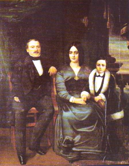 Emile Zola avec ses parents